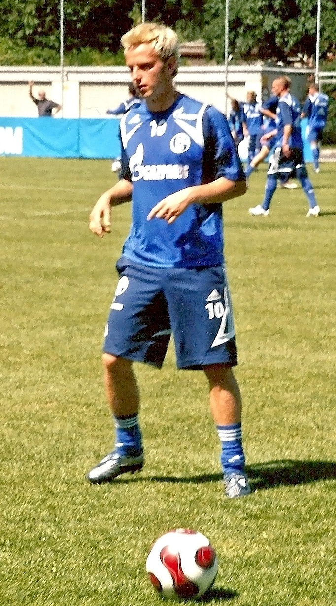 Swiss-Croatian soccer player Ivan Rakitic